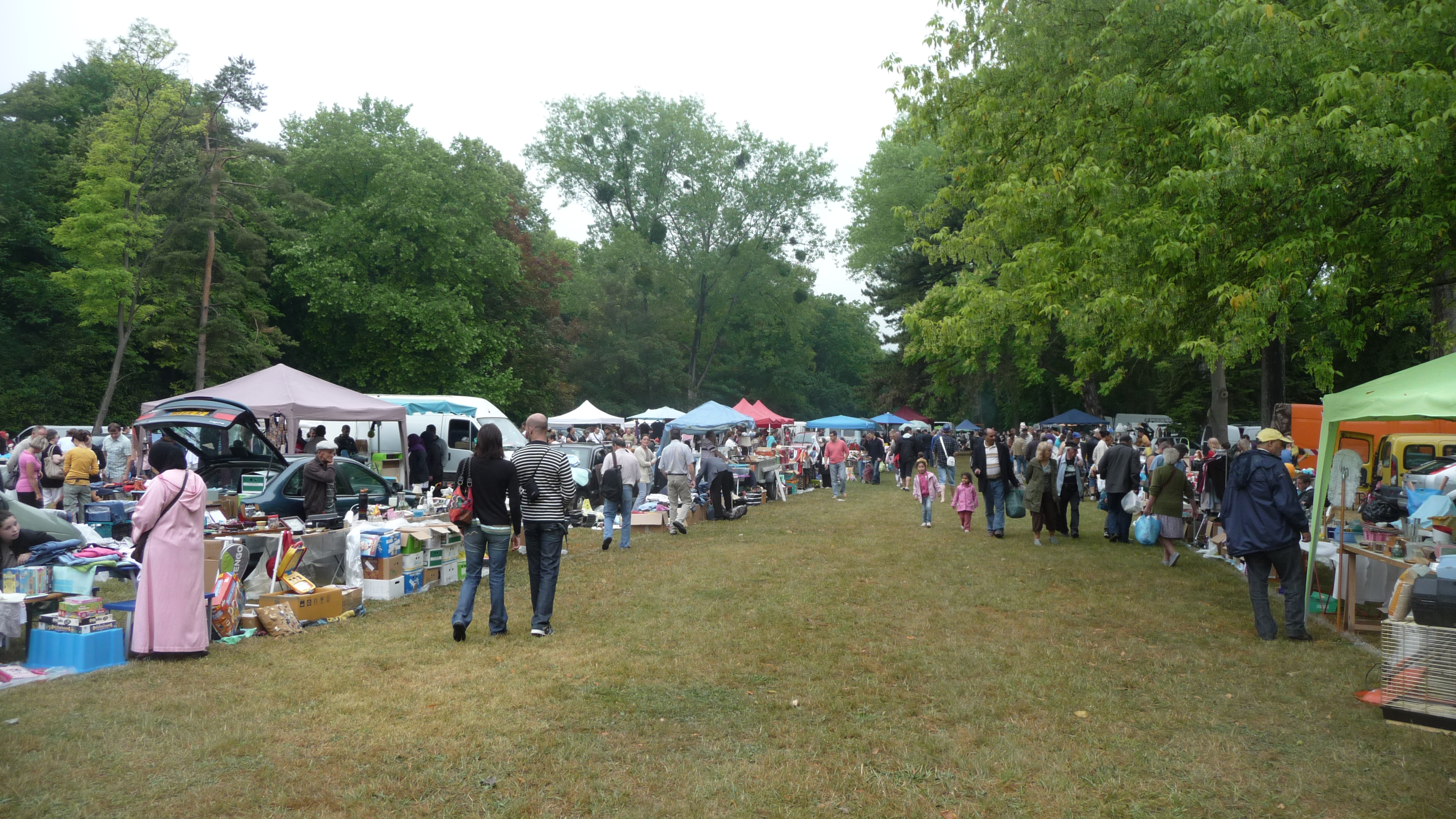 brocante dans le parc du château à Épône (Yvelines - France)